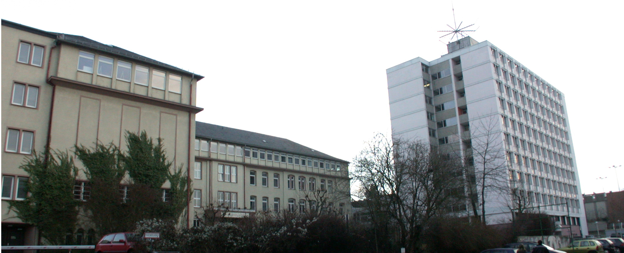 Marienschule Limburg, Deutschland, Gesamtanlage